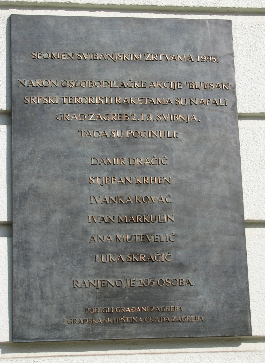 Spomen ploča žrtvama raketiranja Zagreba 1995. godine na Trgu svibanjskih žrtava 1995. u Zagrebu